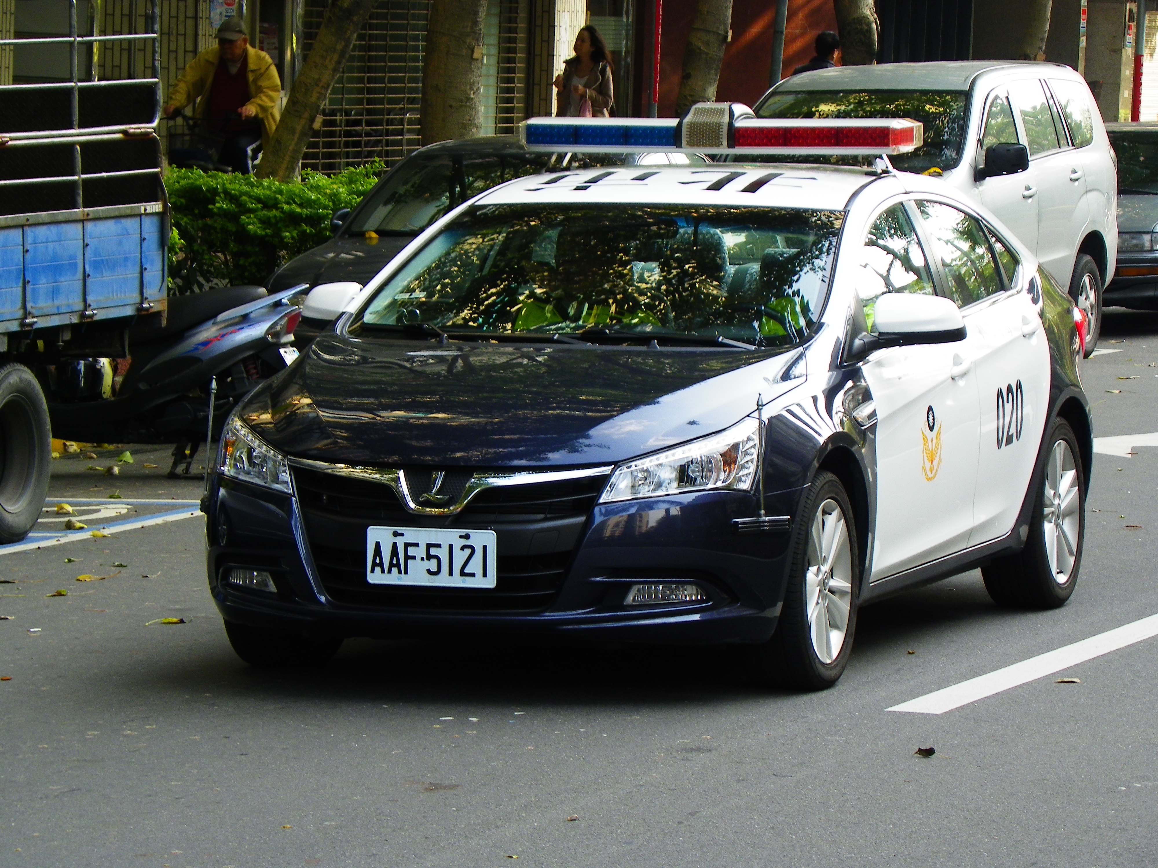 臺北市松山區民生東路五段慢車道的臺北市政府警察局松山分局納智捷5 Sedan 2.0警車AAF-5121，攝於松山慈祐宮建宮260週年紀念媽祖遶境活動。